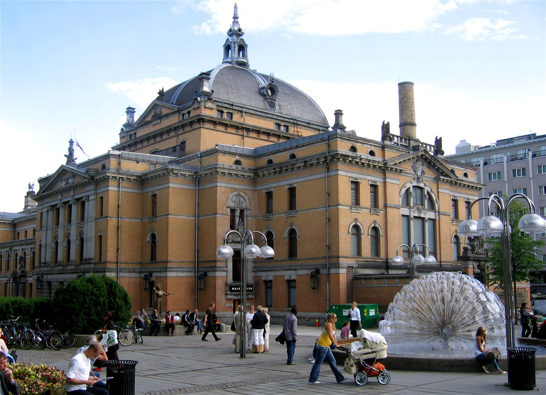 Nationaltheater, Oslo, Norwegen